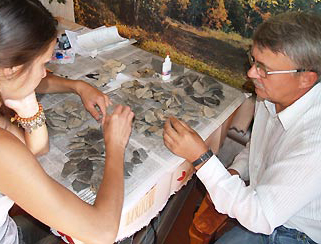 Майкопская археологическая экспедиция. "Камералка": находки из подкурганного поселения новосвободненской культуры. Станица Новосвободная, 2007 год.